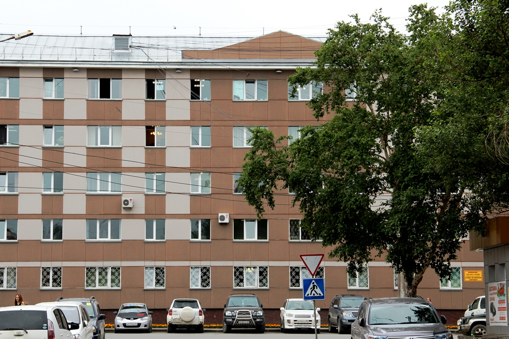 Здание в Южно-Сахалинске по ул. Дзержинского 23, где находится Сахалинский областной центр народного творчества